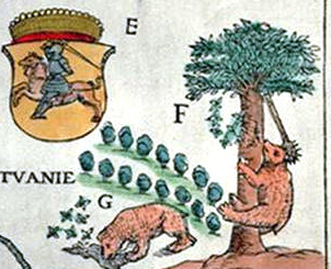 Беларуская (тарашкевіца): Пазначэньне на старажытнай мапе на землях ВКЛ існаваньня бортніцтва. Вытворная праца з Файл:Carta_Marina-lightened.jpg, аўтарства User:Bonas у :commons: , які зьмяніў атрыгінальны твор аўтарства Olaus Magnus, тэрмін аховы аўтарскіх правоў якога выйшаў і які загрузіў Debivort у en.wikipedia